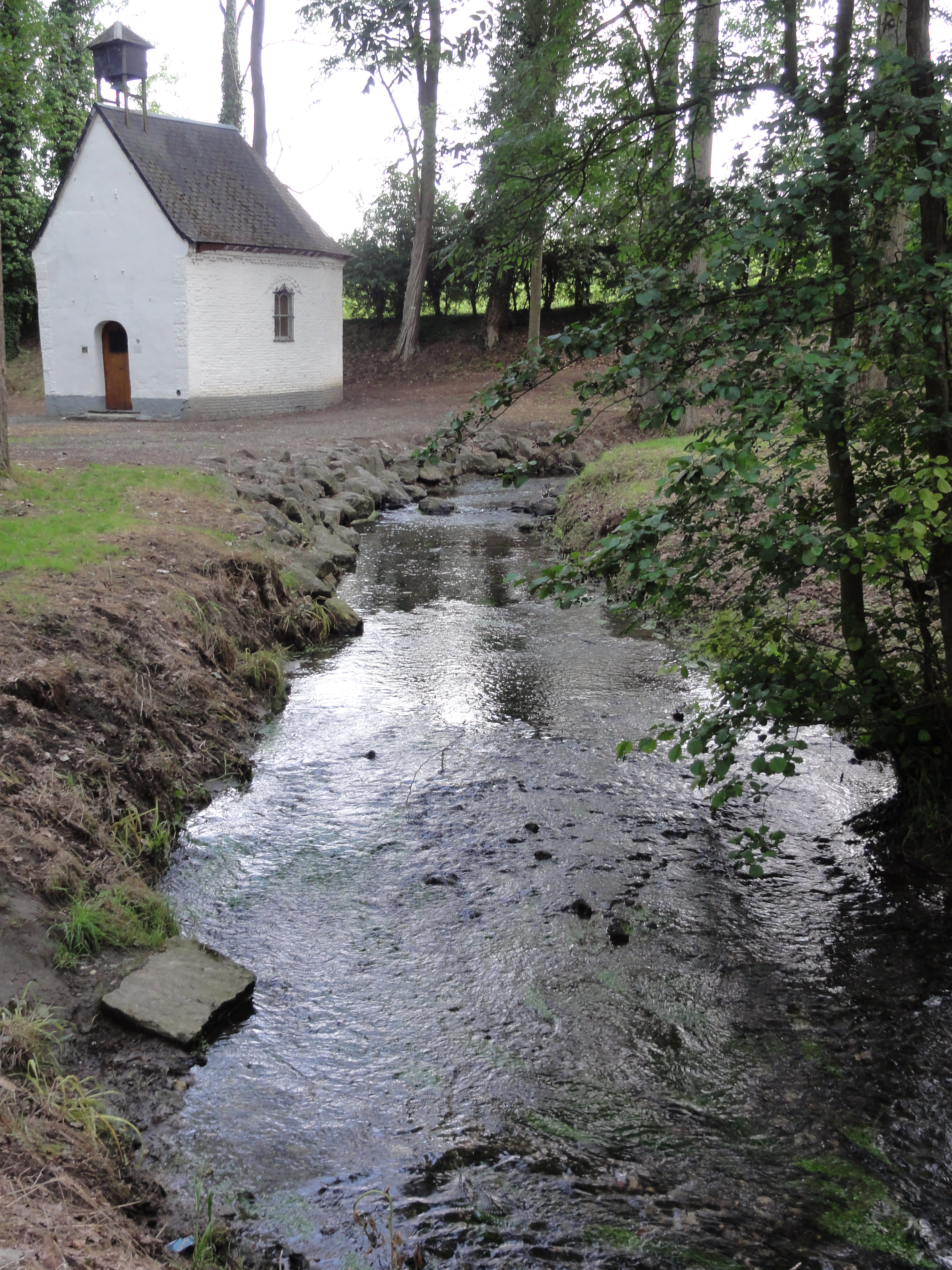 Salesches (Nord, Fr) ruisseau St.Georges, chapelle Notre-Dame-des-Prés